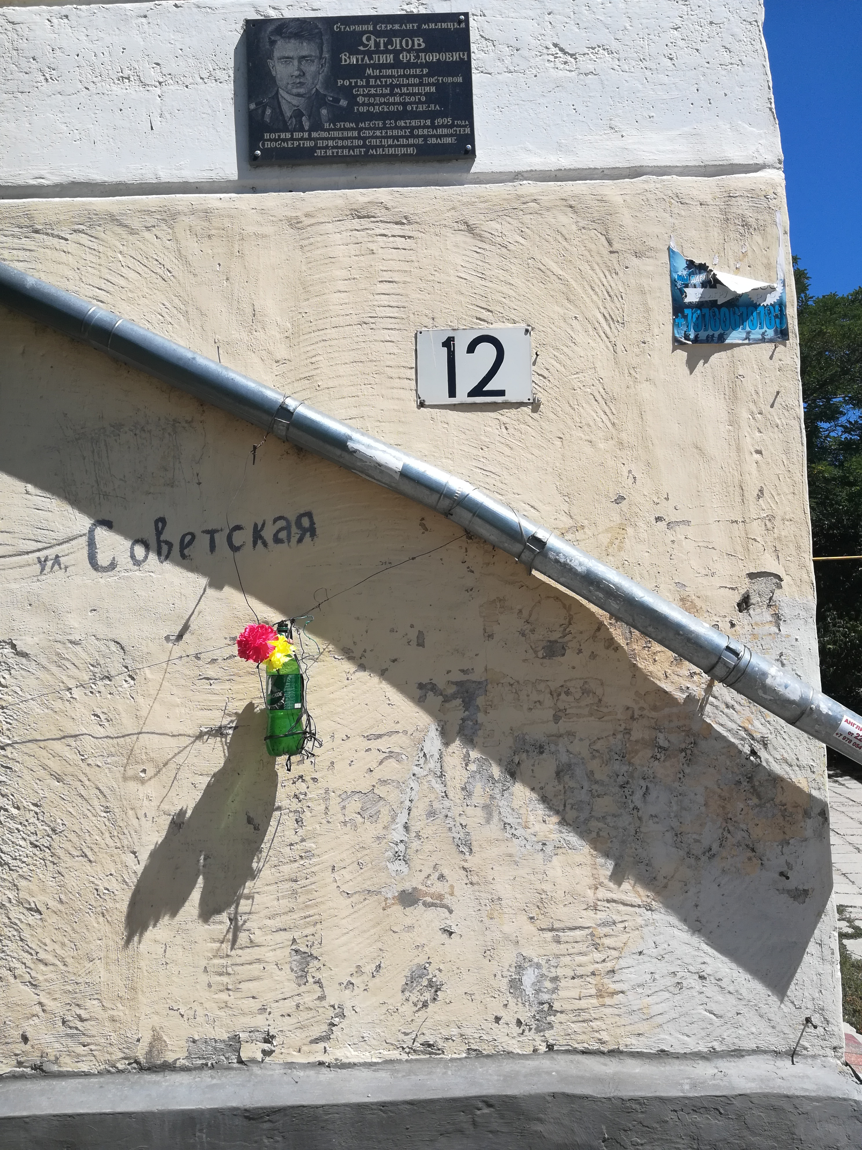 Советская улица